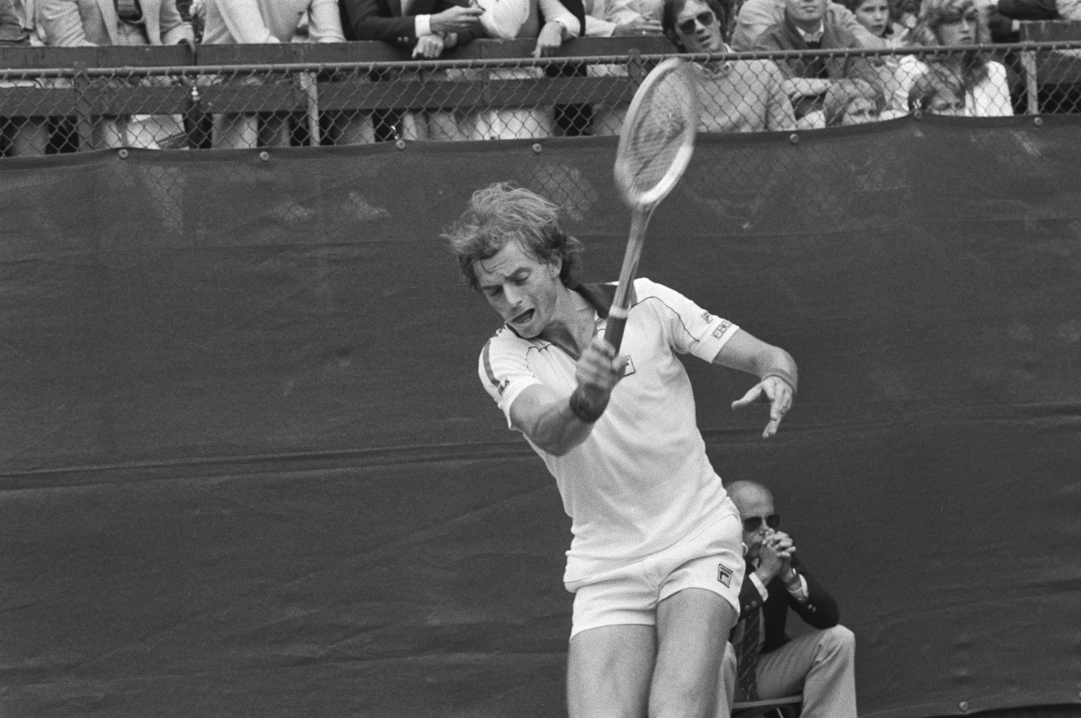 Collectie / Archief : Fotocollectie Anefo Reportage / Serie : [ onbekend ] Beschrijving : Tennis finale heren enkel; Gunthardt tegen Taroczy Melkhuisje Hilversum; Gunthardt in actie Datum : 26 juli 1981 Locatie : Hilversum Trefwoorden : TENNIS Instellingsnaam : Melkhuisje, 't Fotograaf : Bogaerts, Rob / Anefo Auteursrechthebbende : Nationaal Archief Materiaalsoort : Negatief (zwart/wit) Nummer archiefinventaris : bekijk toegang 2.24.01.05 Bestanddeelnummer : 931-6053